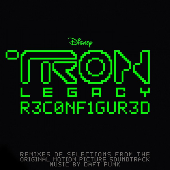 Copertina Del CD Dei Daft Punk Tron: legacy R3C0NF1GUR3Dd